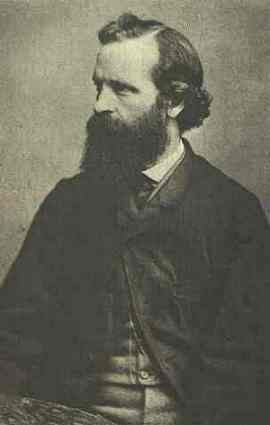 Friedrich Brandt (1823-1891), německý pionýr fotografie